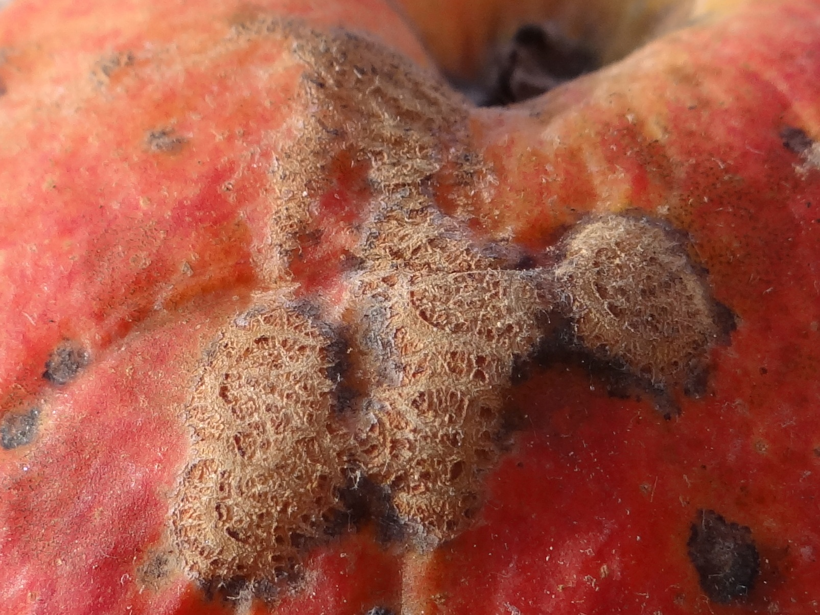 Venturia inaequalis on apple